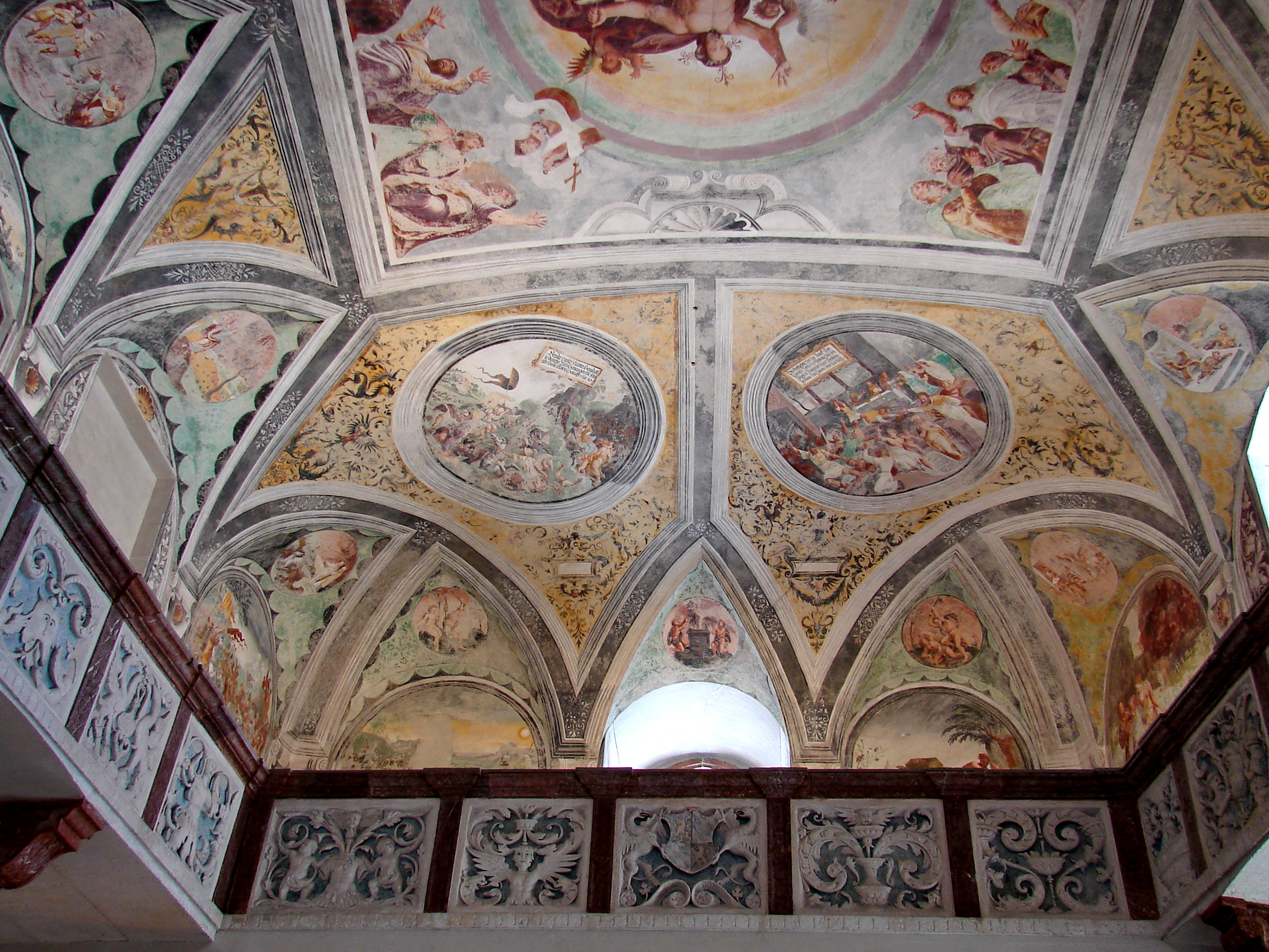 Die Schloßkapelle zu Neuburg a. d. Donau. Einer der frühesten evangelischen Kirchenräume im Spiegelbild von Reformation und Gegenreformation.